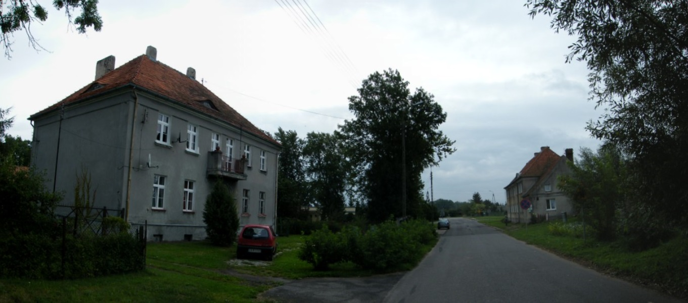 Budynek SG Janowo (z lewej), w dali po prawej posterunek niemieckiego Zollgrenzschutzu.